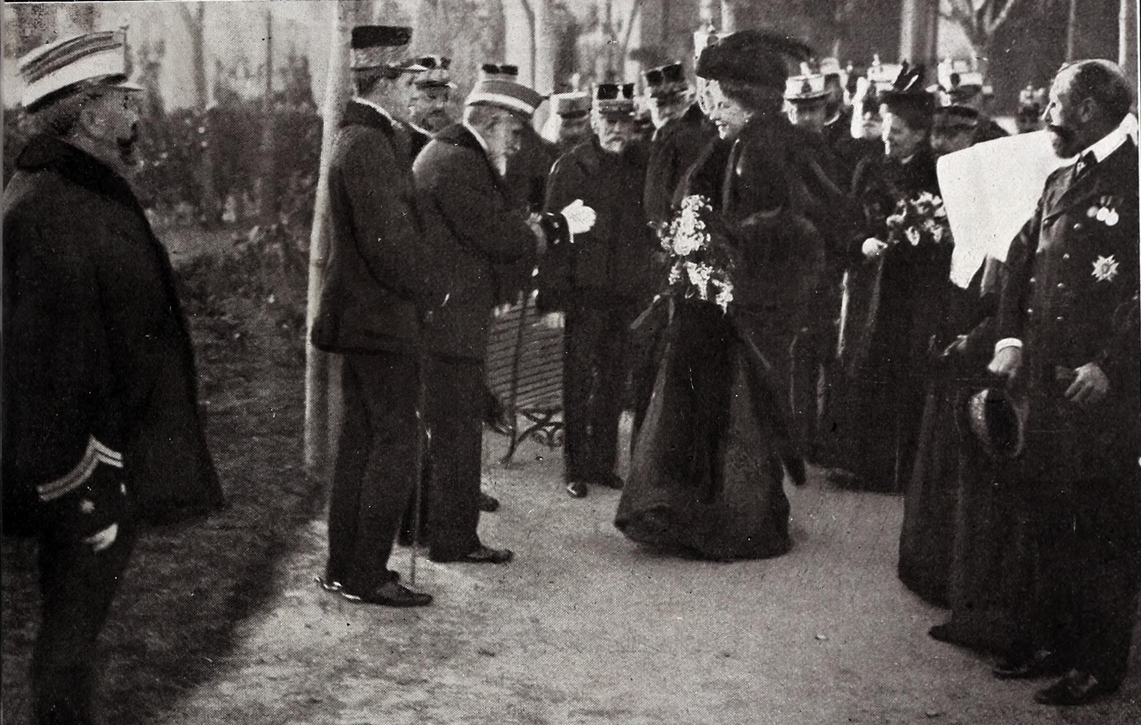 Visita de sus majestades al Hospital Militar de Madrid, en Carabanchel.